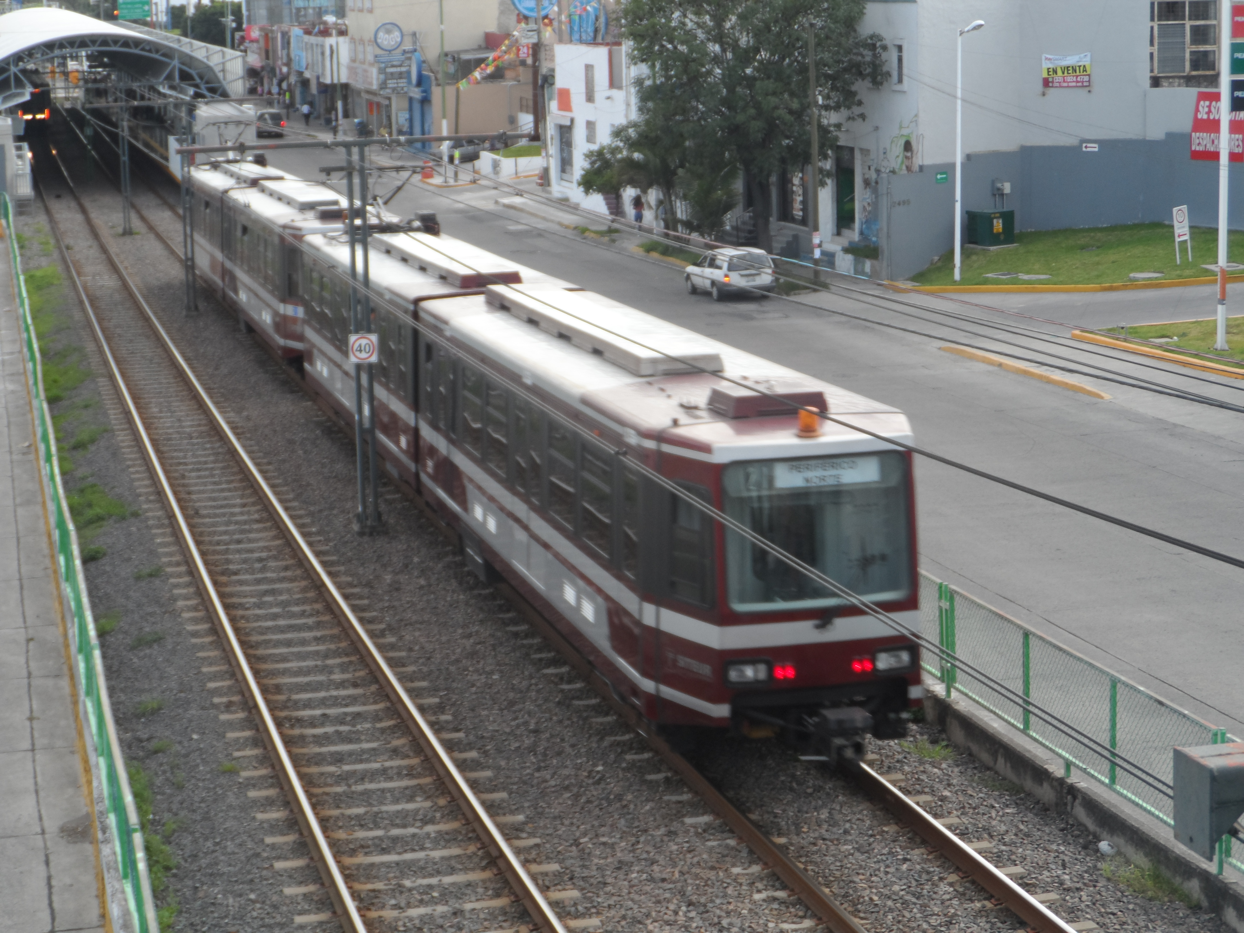 Un tren ligero modelo "TLG-88" llegando a la estación Atemajac de la Línea 1 del Tren Ligero de Guadalajara.